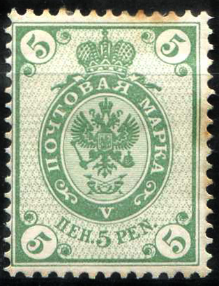 Марка Великого княжества Финляндского, девятый выпуск, 1901, 5 пенни